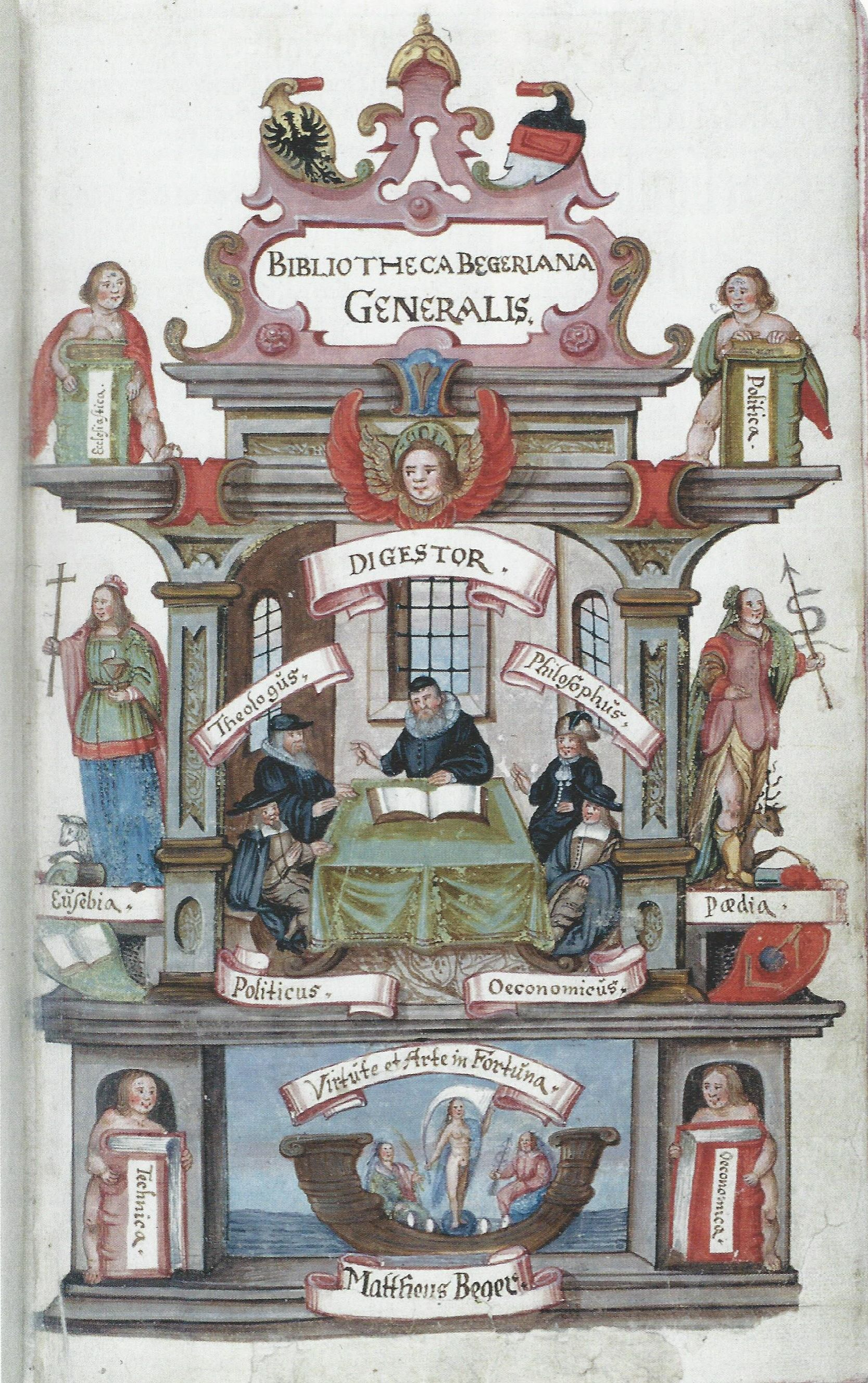 Titel des Bibliotheksverzeichnisses der "Bibliotheca Begeriana generalis", des ersten Katalogs der Stadtbibliothek Reutlingen, Stadtbibliothek Reutlingen